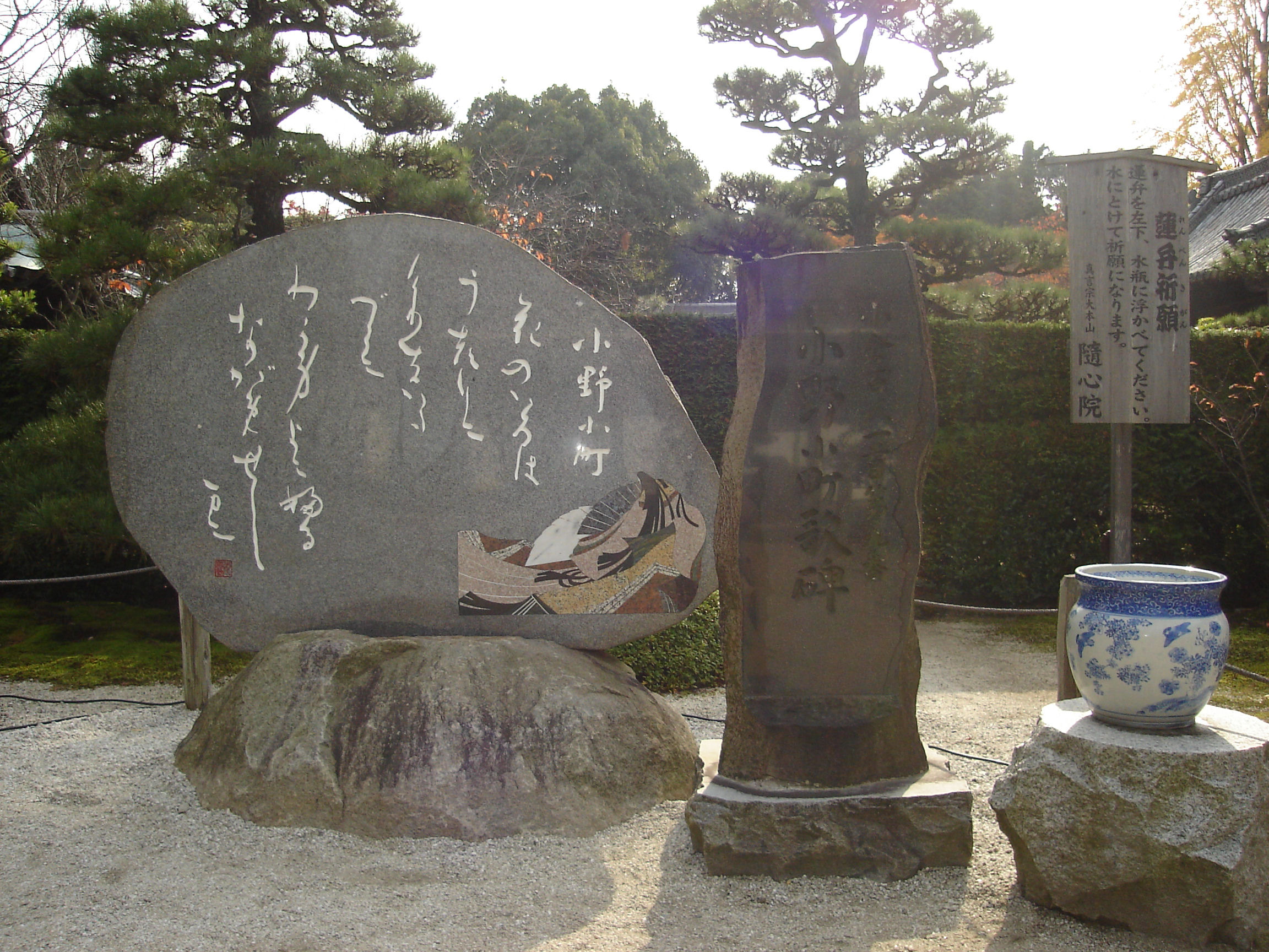 Onono Komachi Kahi(monument) in Zuishinin , kyoto japan